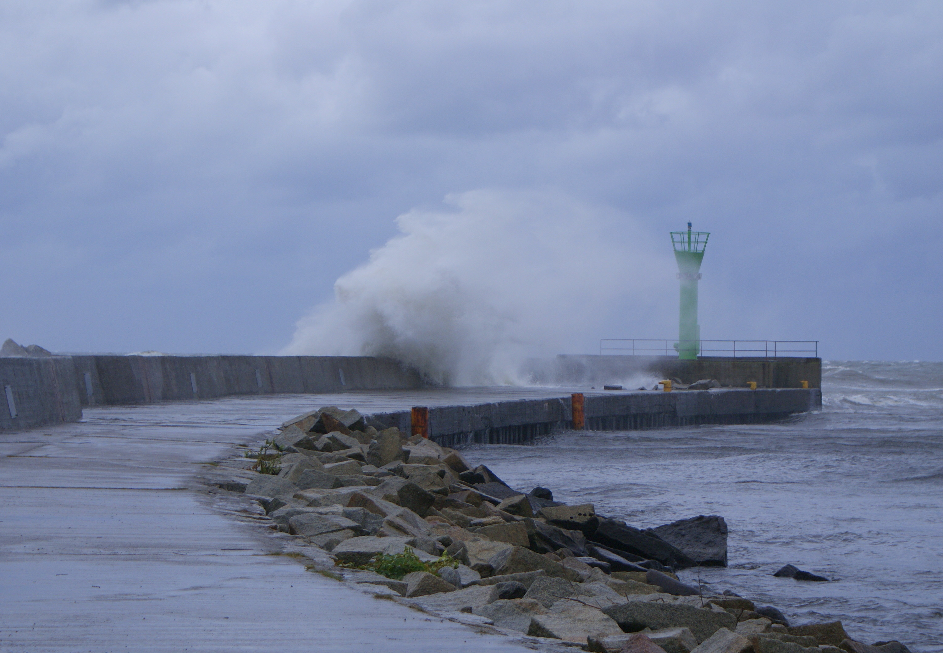 Fala morska podczas silnego wiatru na zachodnim falochronie portu Mrzeżyno